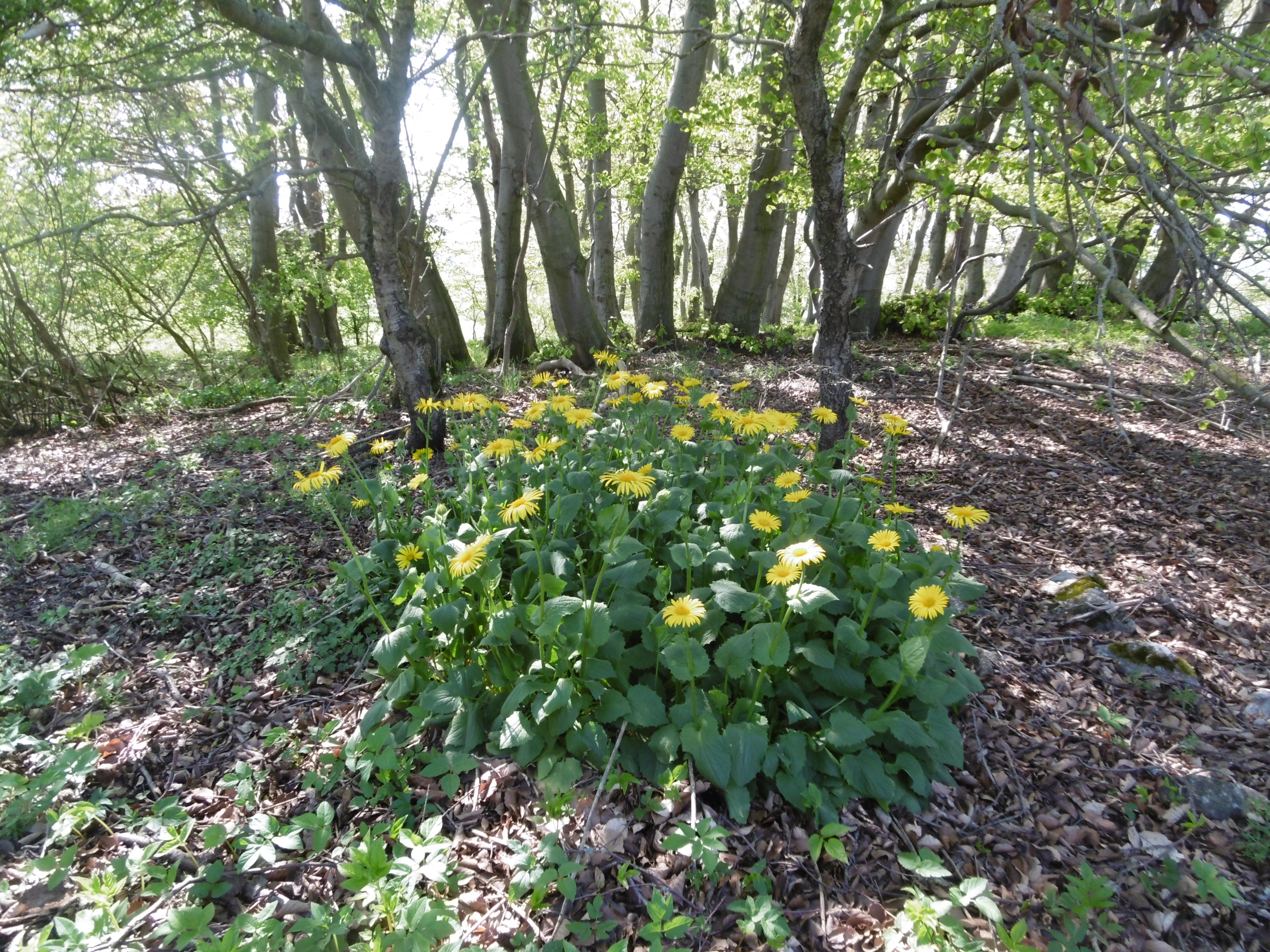 Kriechender Gämswurz (Doronicum pardalianches) im Naturschutzgebiet Scheffelberg/Kalberstert. Kein natürliches Vorkommen!